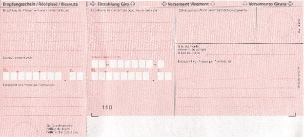 Einzahlungsschein